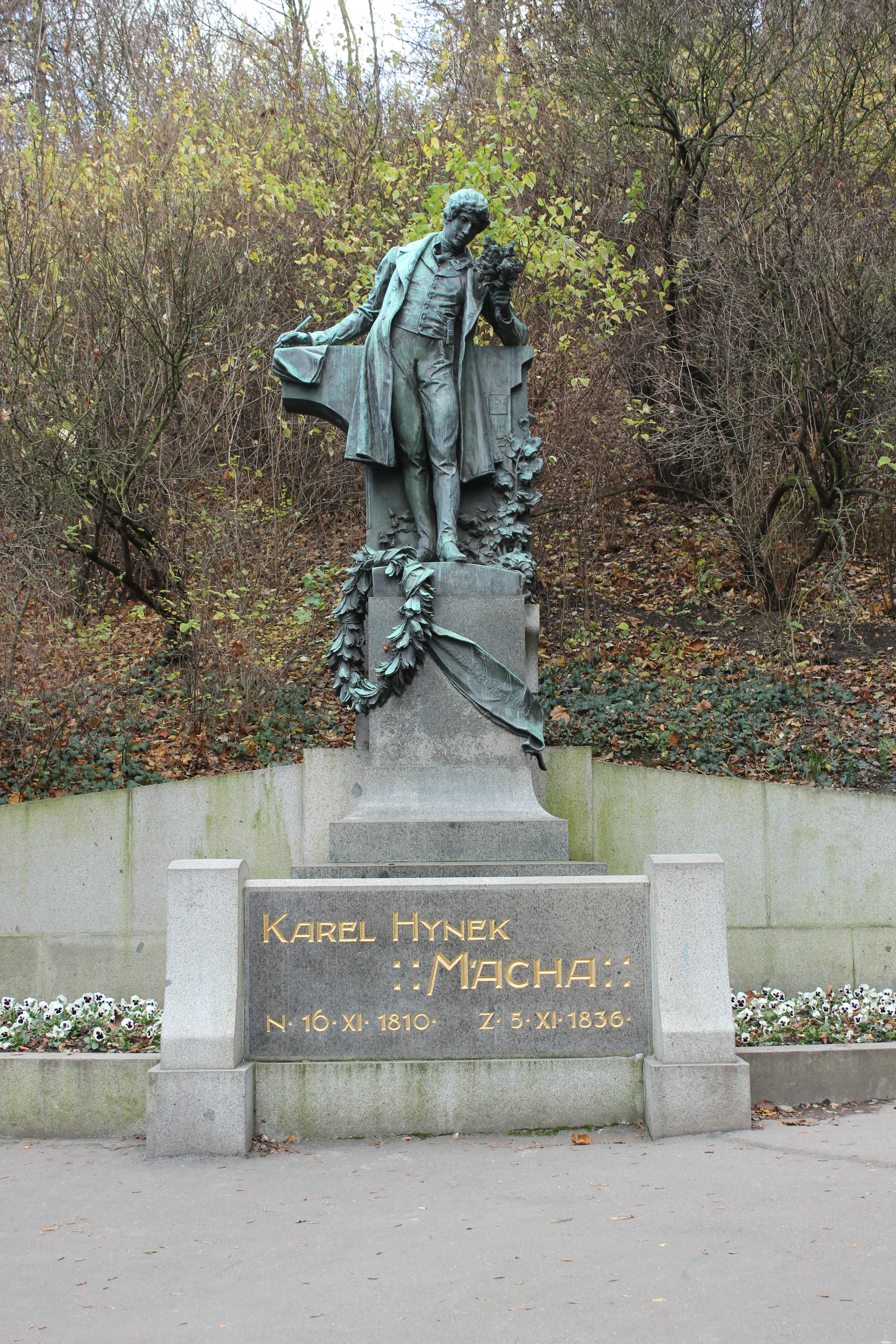 Socha Karla Hynka Máchy na pražském Petříně.